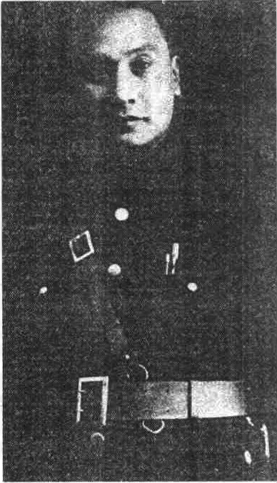 卢汉